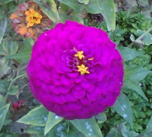 Mor renkte sarı polenli bir çiçek.